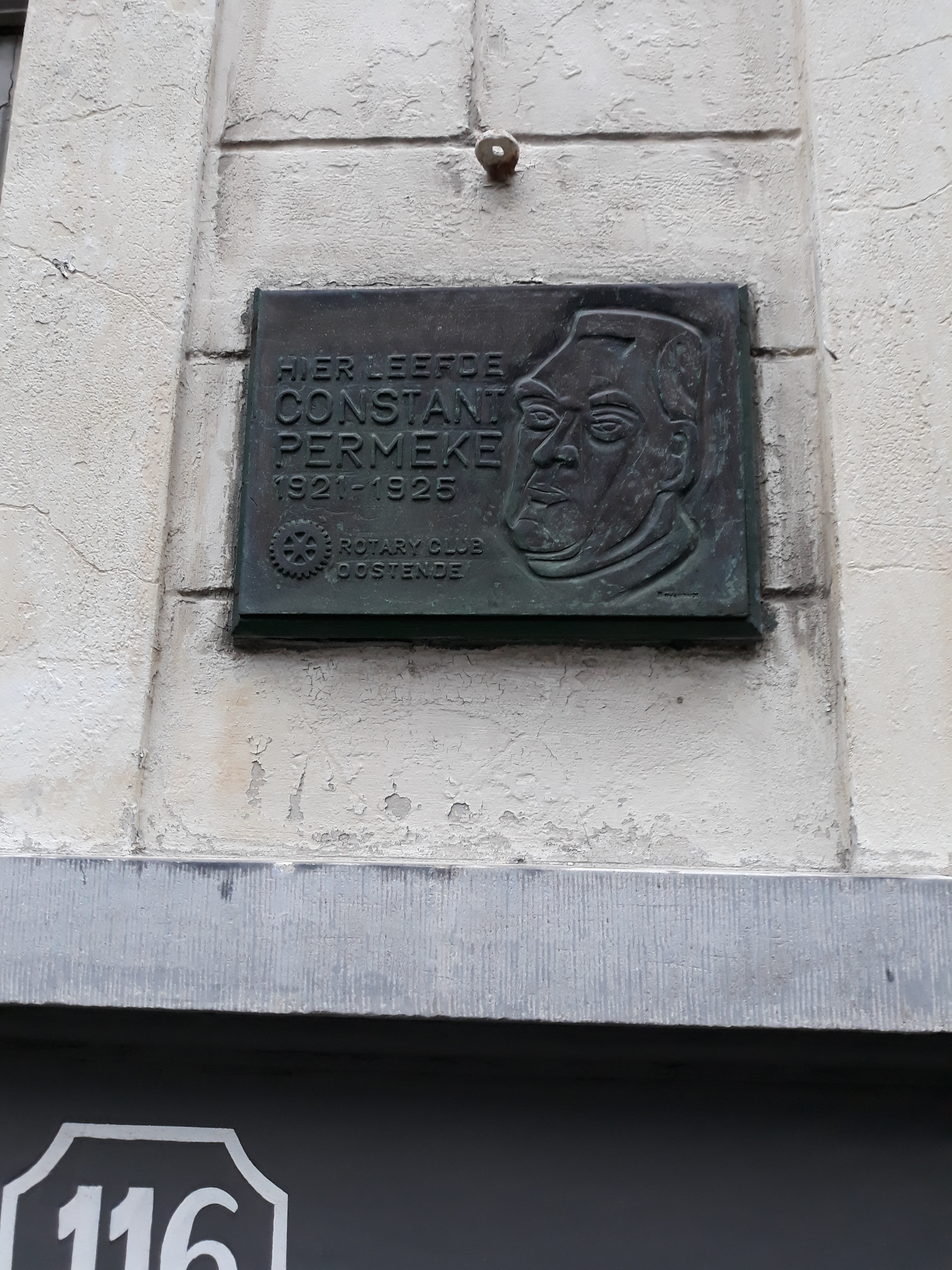 Gedenktafel für den belgischen Maler Constant Permeke an seinem ehemaligen Wohnhaus in Oostende.